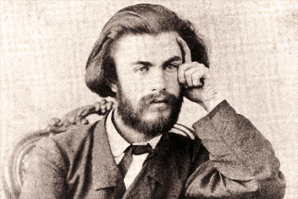 Драгоманов Михайло